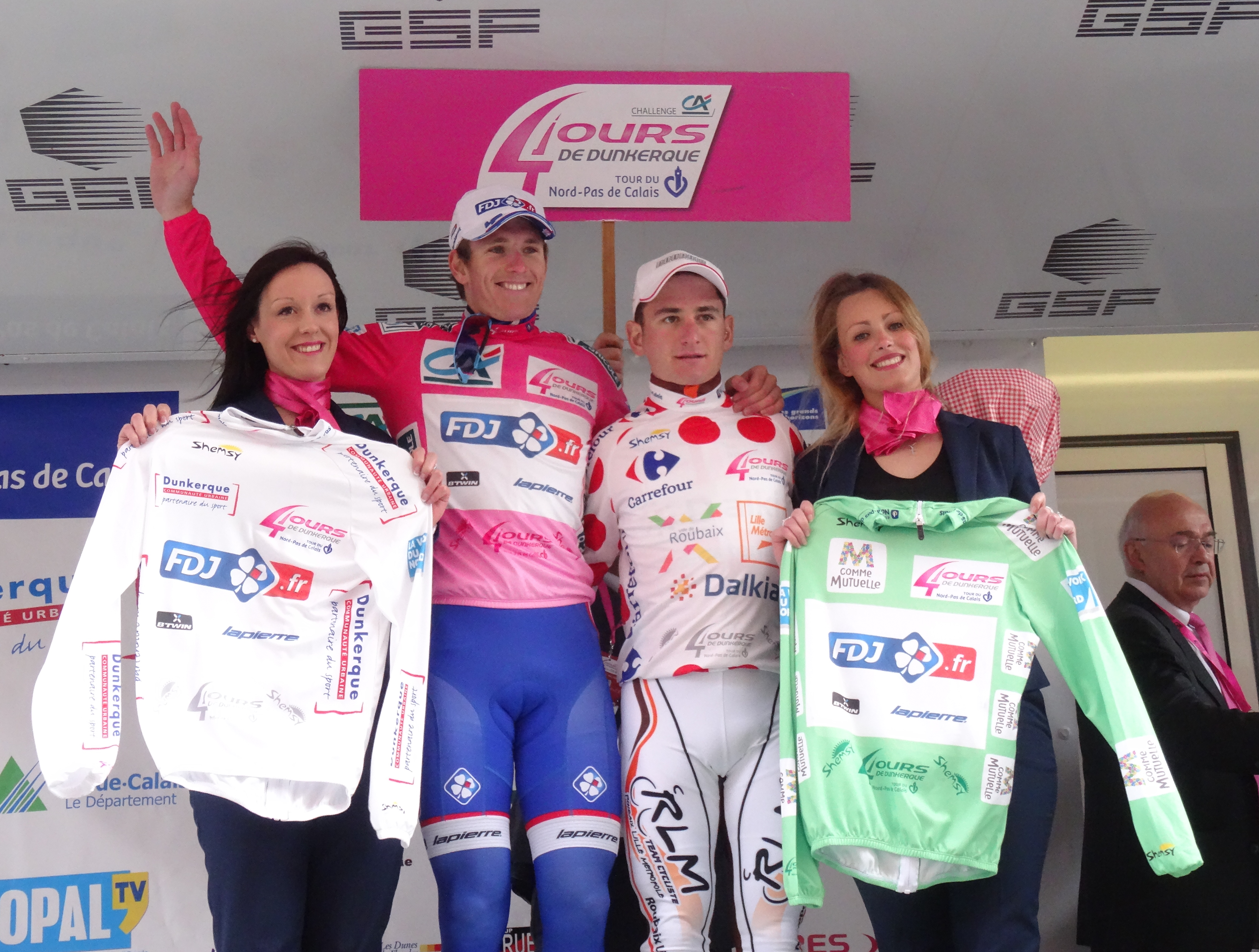 Reportage photographique réalisé le dimanche 11 mai 2014 à l'arrivée de la cinquième et dernière étape de l'édition 2014 des Quatre jours de Dunkerque à Dunkerque, Nord, Nord-Pas-de-Calais, France. Depicted people: Arnaud Démare and Rudy Kowalski Depicted team: FDJ.fr, Roubaix Lille Métropole